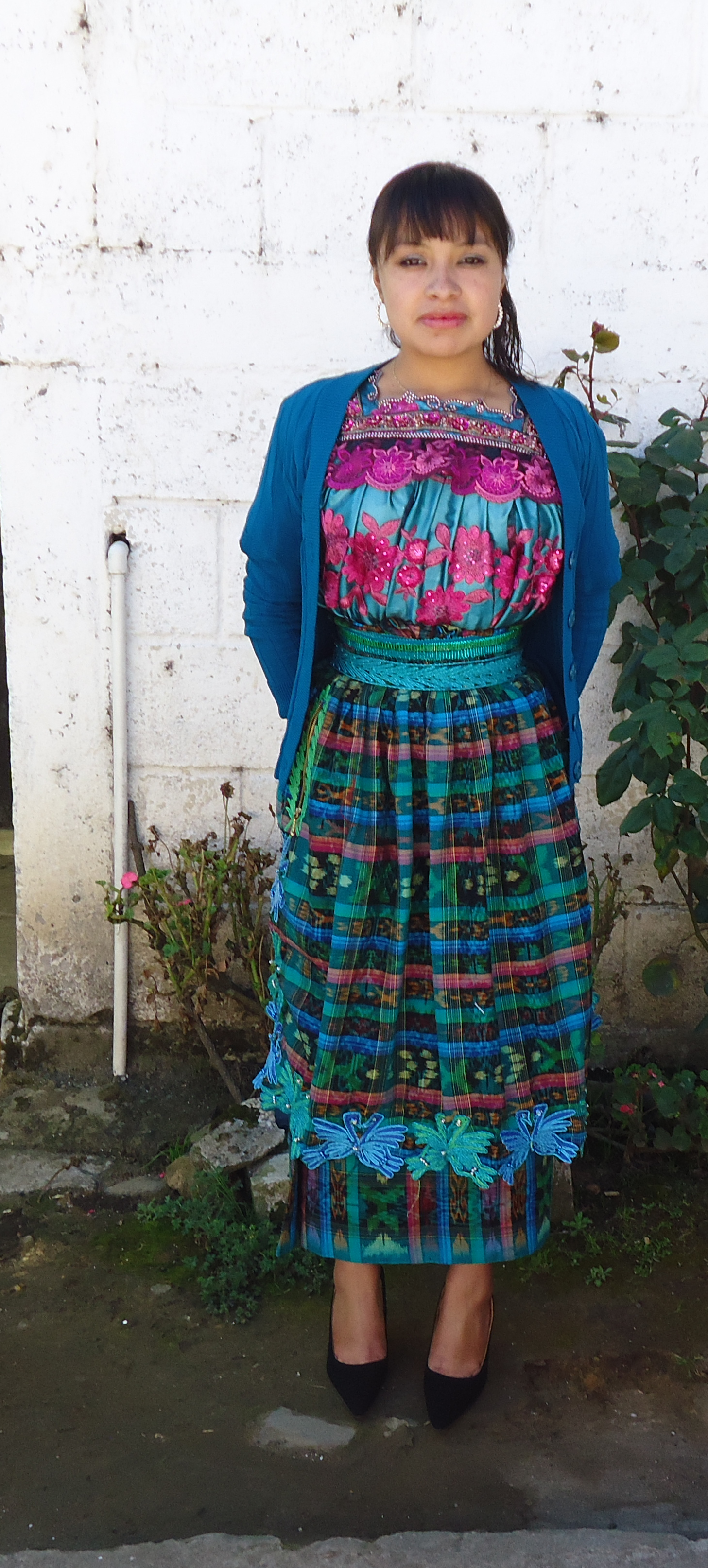 Traje utilizado en el municipio de Ixchiguán.